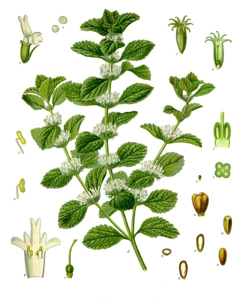 Andorn. A Theil der blühenden Pflanze, nat. Grösse; 1 Blüthe, vergrössert; 2 Krone zerschnitten und auseinandergebreitet, desgl.; 3 Staubgefässe, desgl.; 4 Pollen, desgl.; 5 Kelch, desgl.; 6 Kelch zerschnitten, mit Stempel, desgl.; 7 Stempel, desgl.; 8 unterer Theil des Stempels mit 2 Carpellen im Längsschnitt, desgl.; 9 derselbe im Querschnitt, desgl.; 10 Nüsschen, natürl. Grösse und vergrössert; 11 und 12 einzelnes Nüsschen von verschiedenen Seiten, desgl.; 13 und 14 dasselbe im Längsschnitt, desgl.; 15 dasselbe im Querschnitt, desgl.